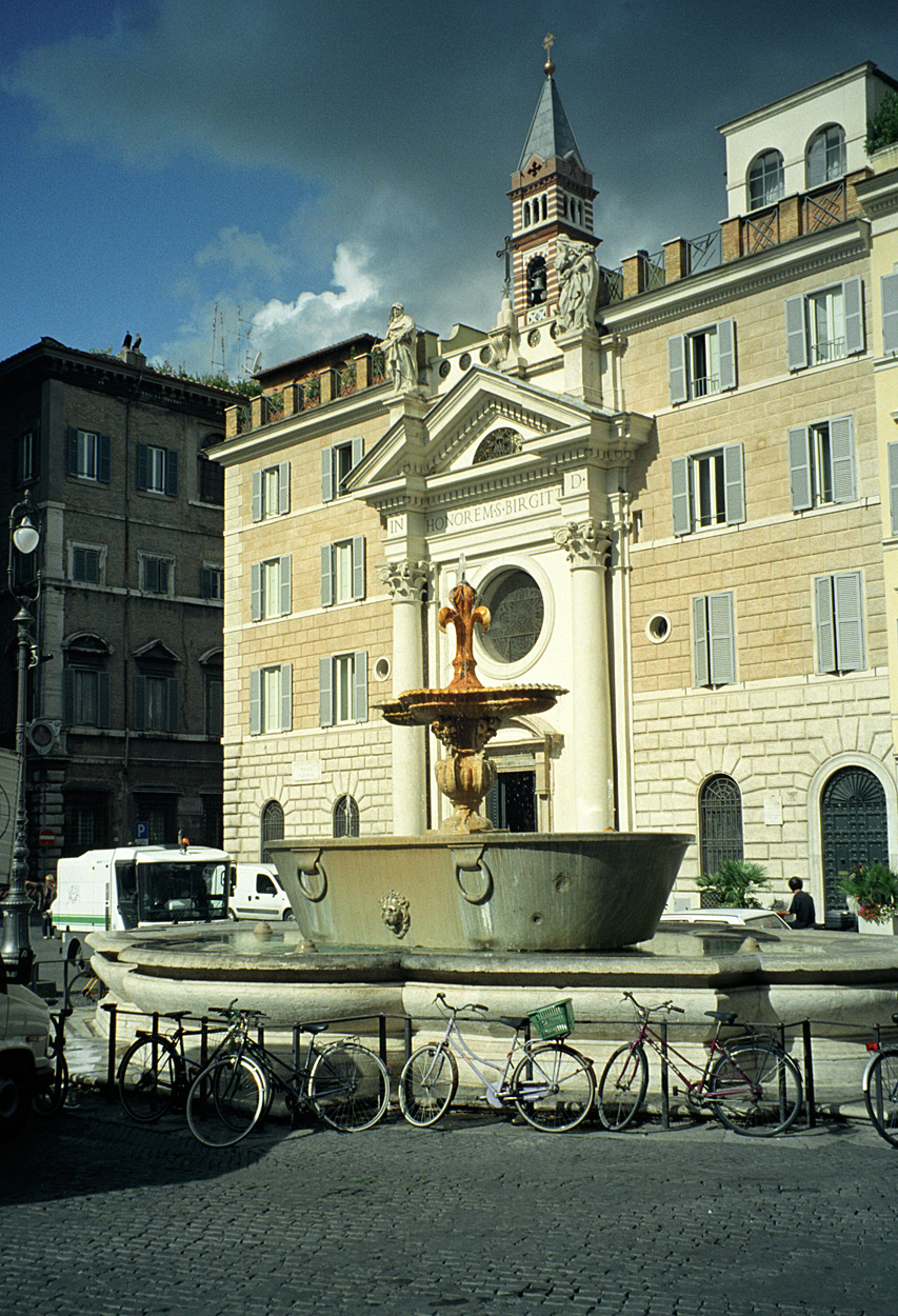 Roma, Piazza Farnese